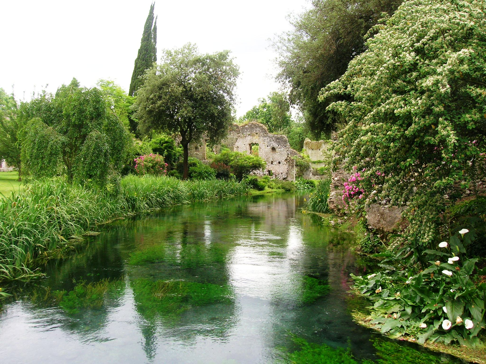 Il fiume Ninfa nei pressi del ponte di legno